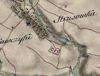 XIX ст.